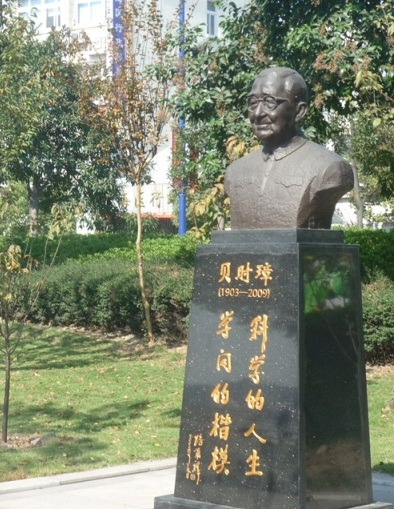 贝时璋像，摄于宁波镇海